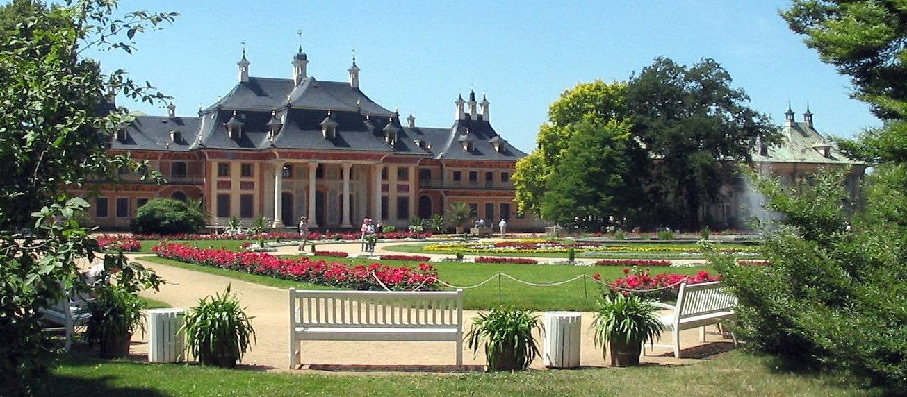 Sujet:Schlass Pillnitz, de Biergpalais Source:Eege Foto vum User:Martinroell